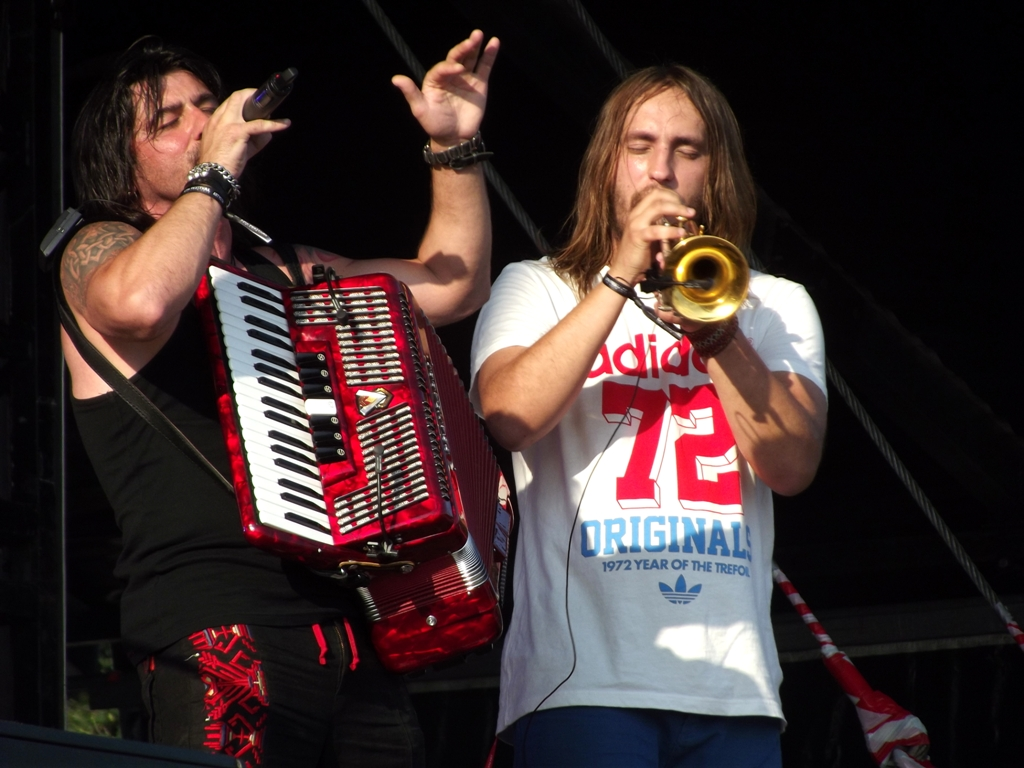 Zdjęcie zrobione podczas drugiego dnia Life Festivalu 2013 w Oświęcimiu.